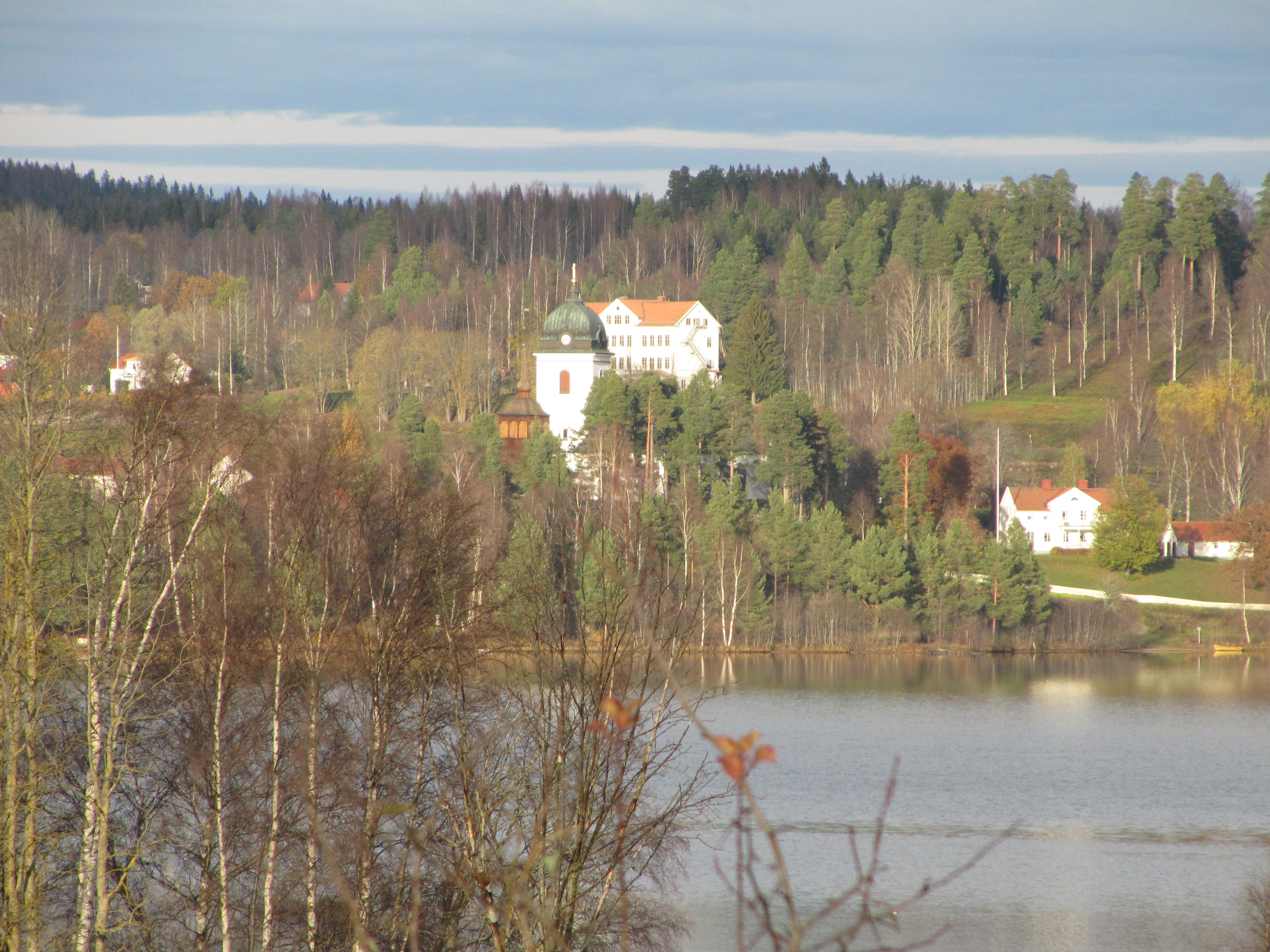 Tuna kyrka på andra sidan sjön Marmen. Bilden är tagen från Attmars kyrka.